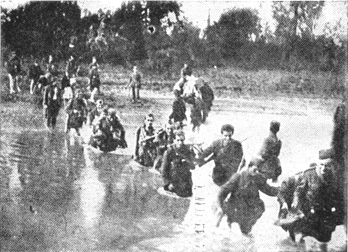 Srpskohrvatski / српскохрватски: Jedinice V krajiške divizije prelaze reku Vrbanju, maja 1943.